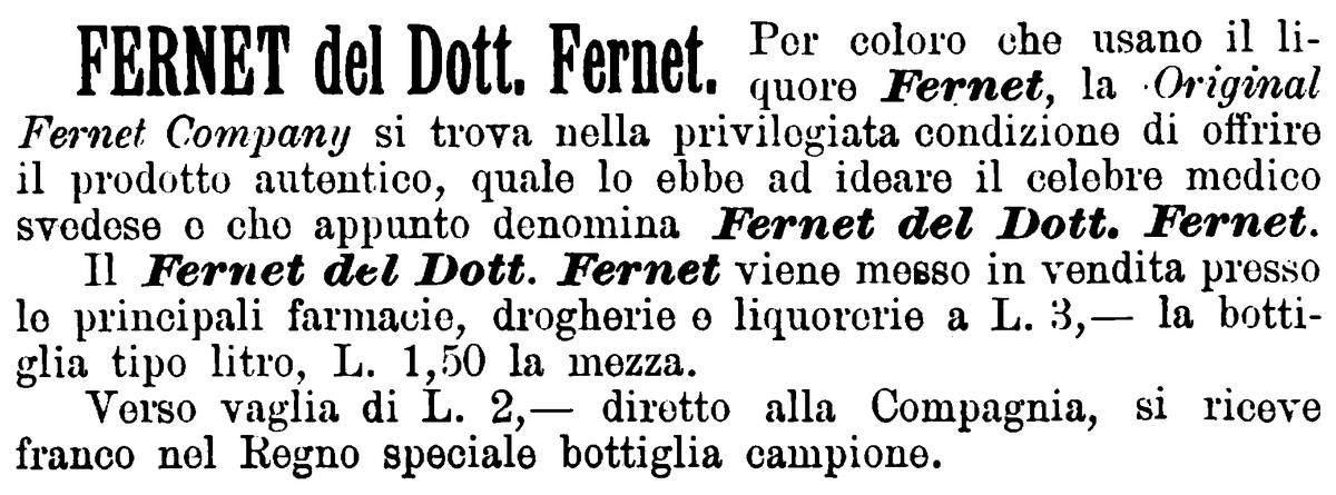 Pubblicità